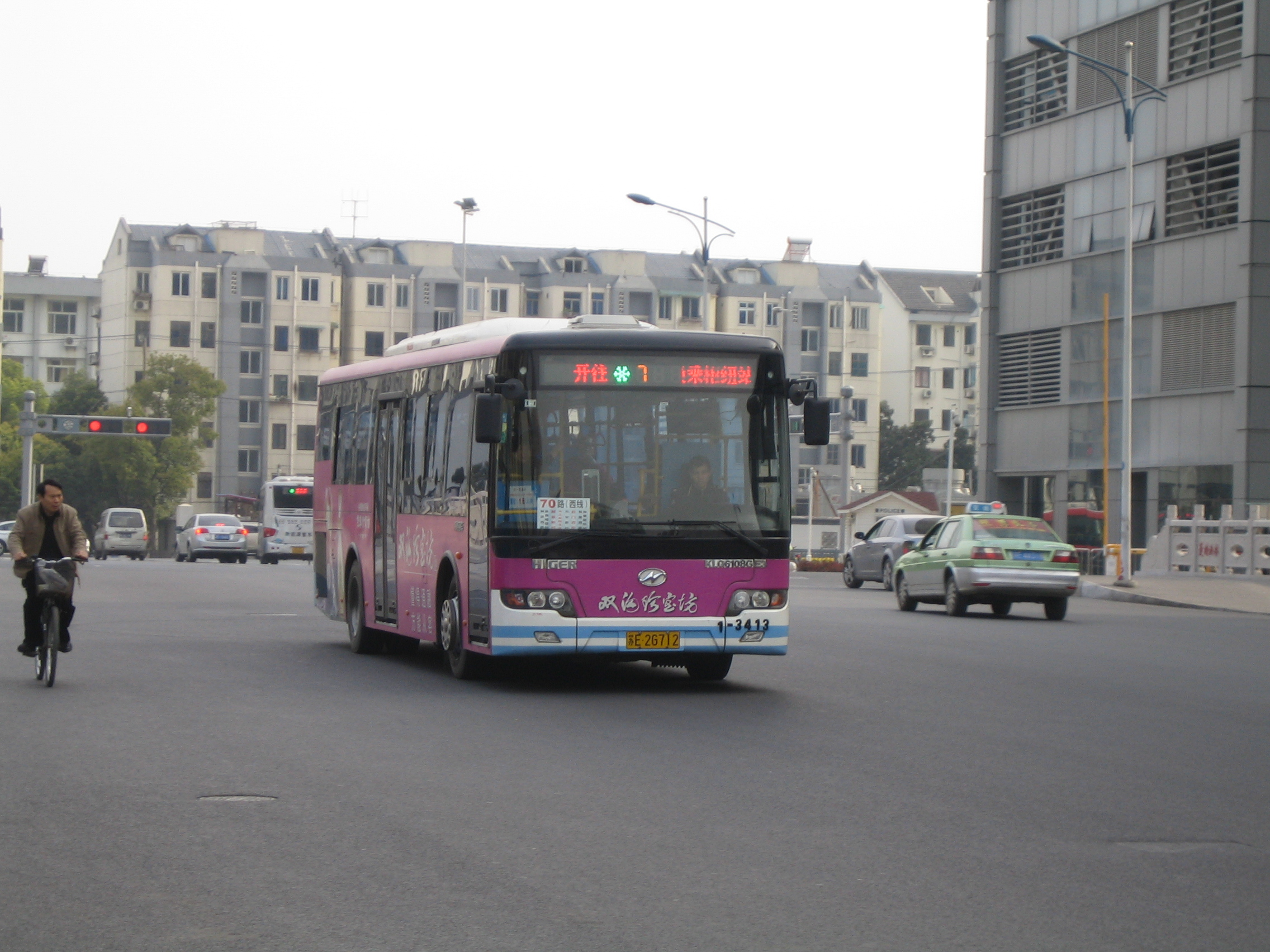 一辆海格公交车行驶于苏州街头，型号：KLQ6108G